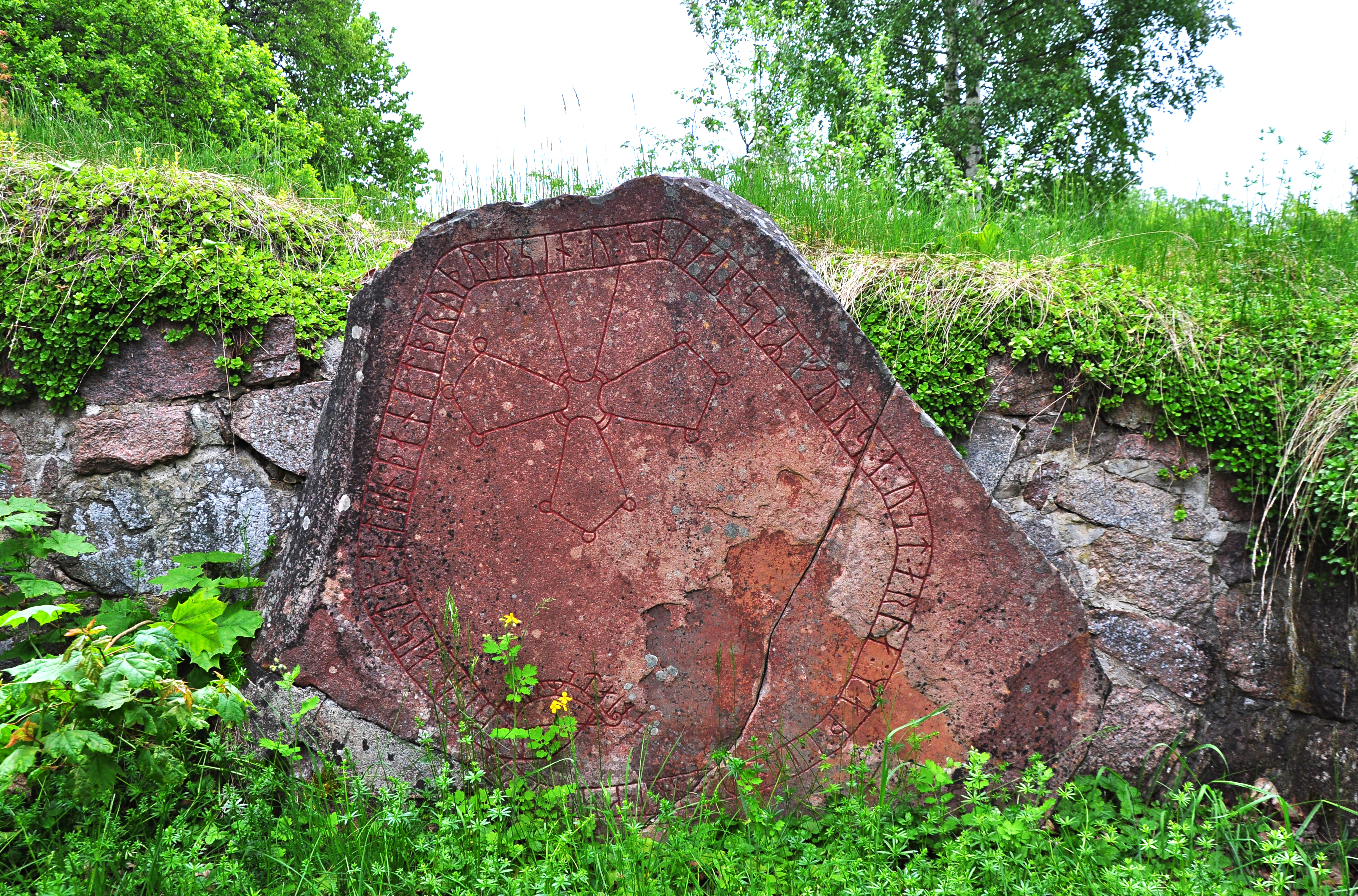 Runsten Sö 335 i Ärja kyrkoruin i Åker i Södermanland.